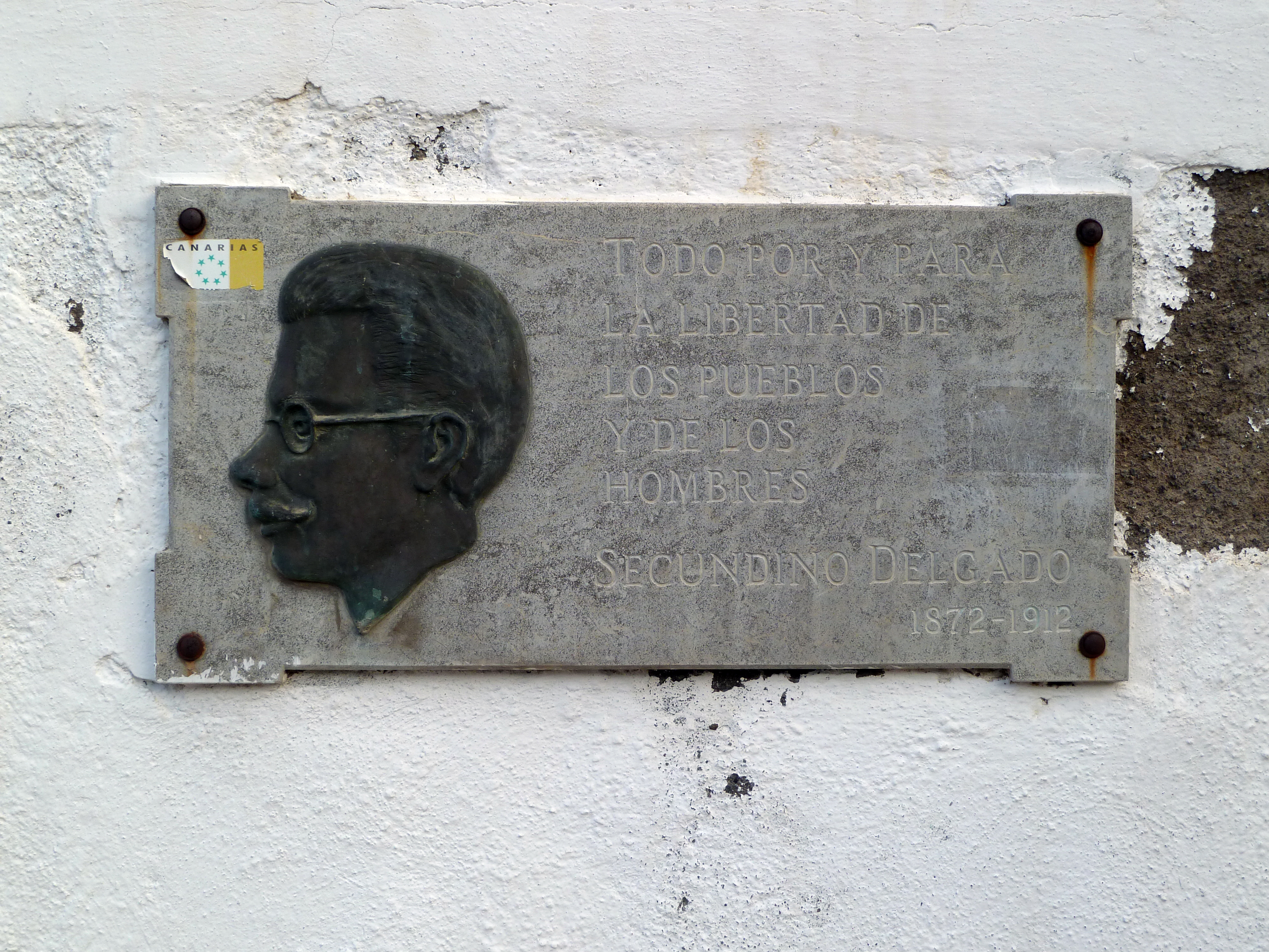 Lápida en memoria de Secundino Delgado Rodríguez (1867-1912), colocada en el cementerio de San Rafael y San Roque, en Santa Cruz de Tenerife (Canarias, España).